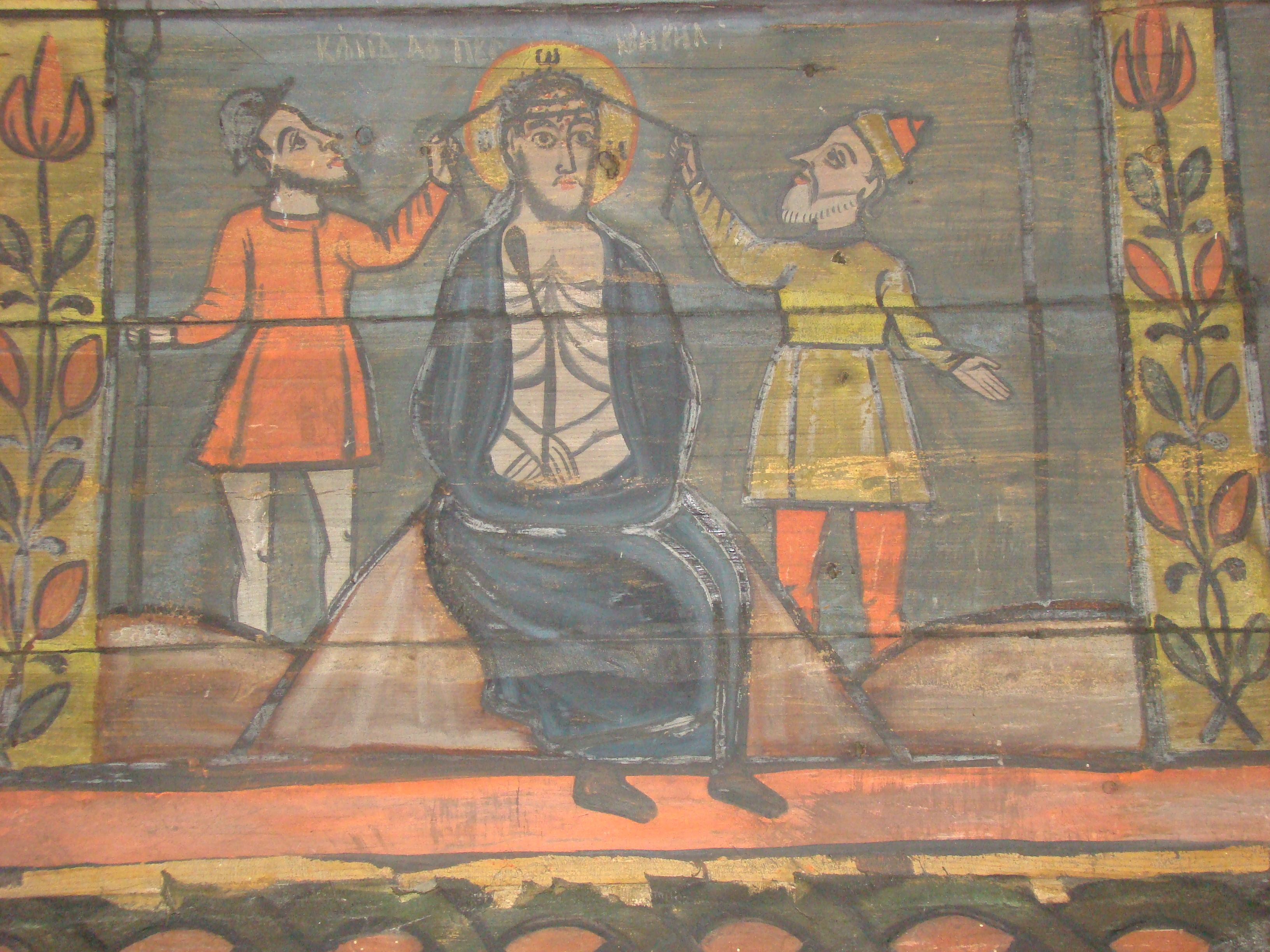 Biserica de lemn „Sf.Dumitru” din Păușa, județul Bihor